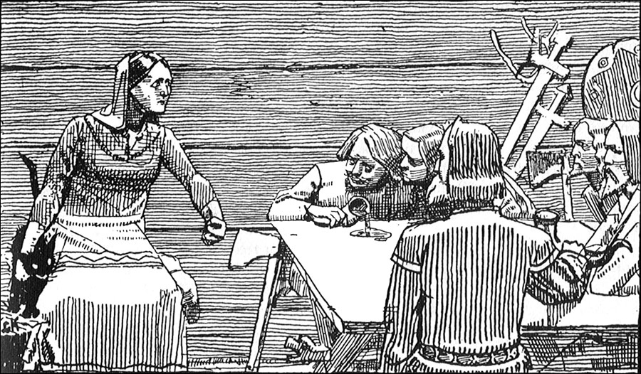 Gunnhild egger sine sønner